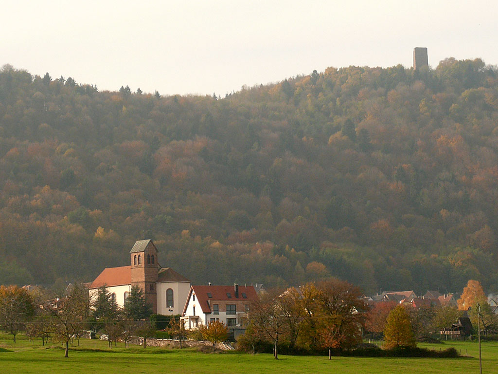 Vue de la commune de Haegen, située au pied des Vosges et du Grand Geroldseck, Eglise Saint-Matthieu